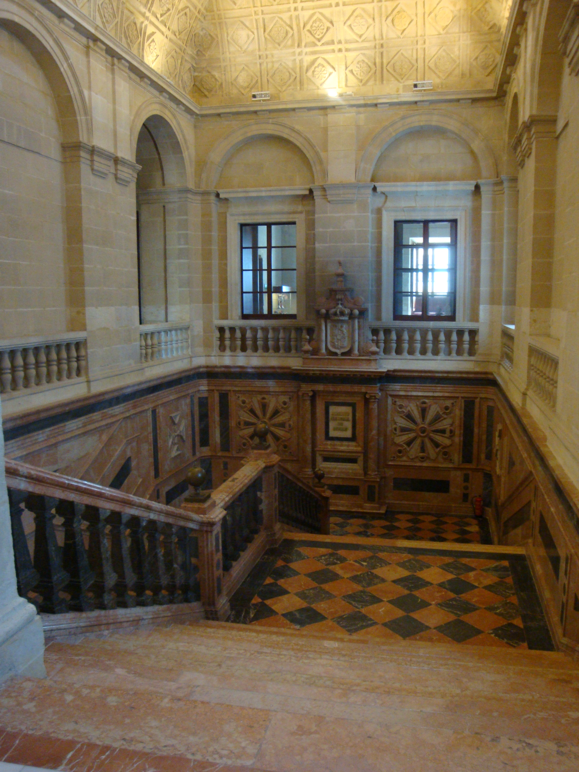 Escalera monumental. Archivo General de Indias. Sevilla (Andalucía, España)